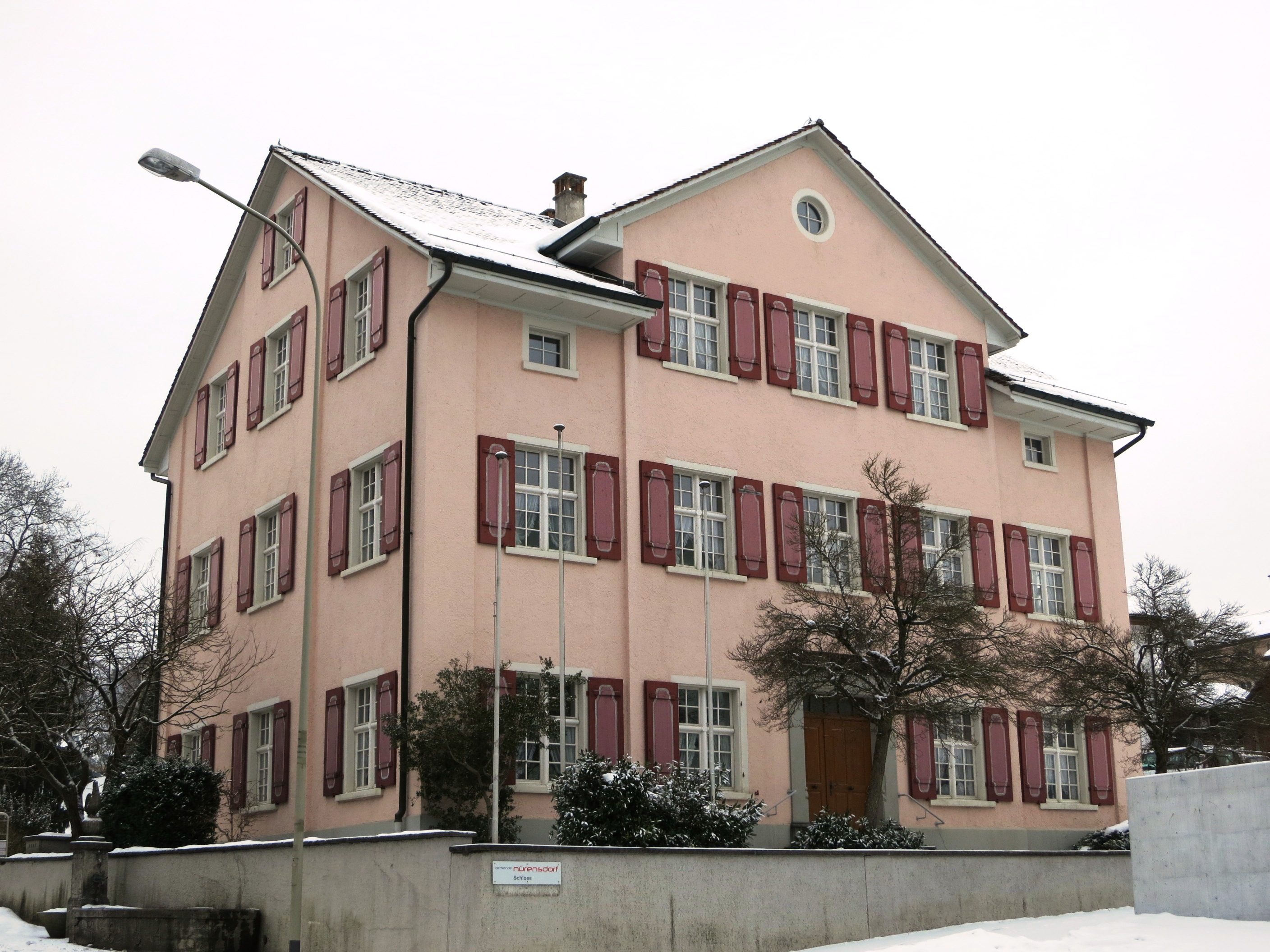 Schloss Nürensdorf ZH, Schweiz